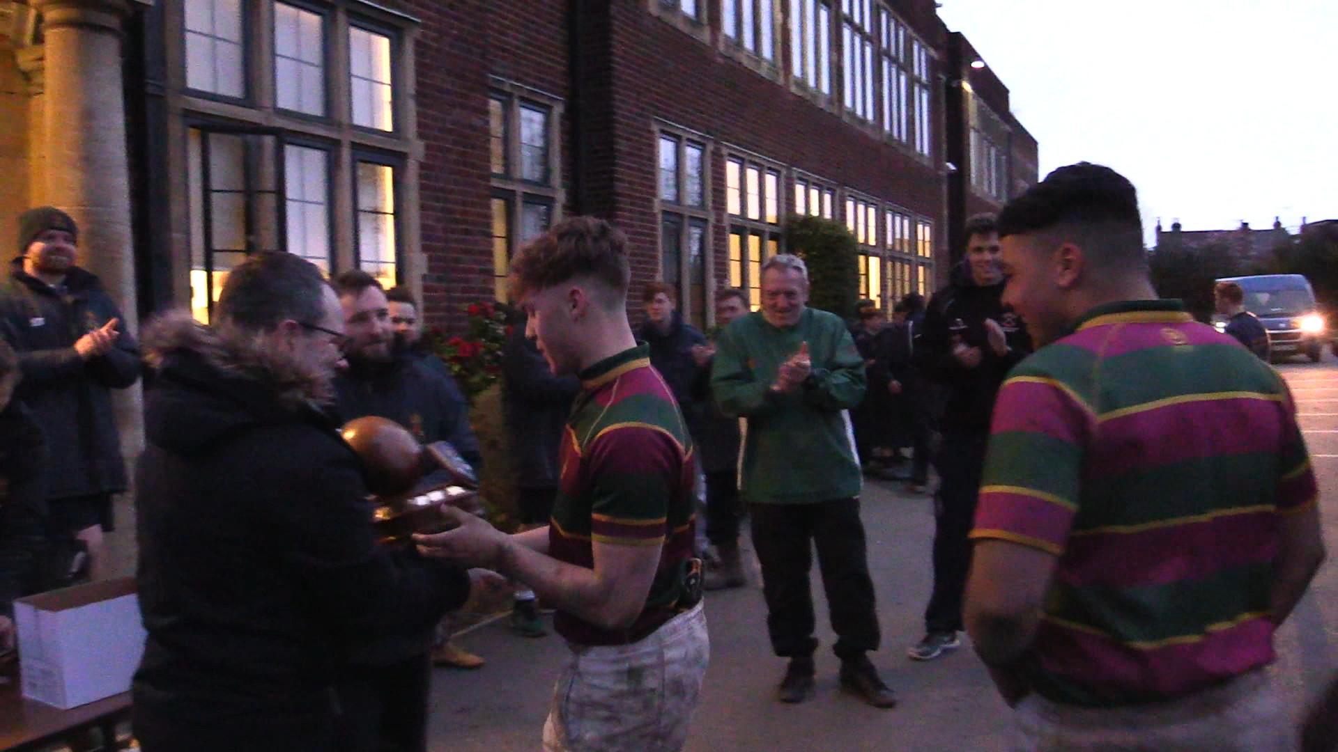 Аҧсшәа: ?????